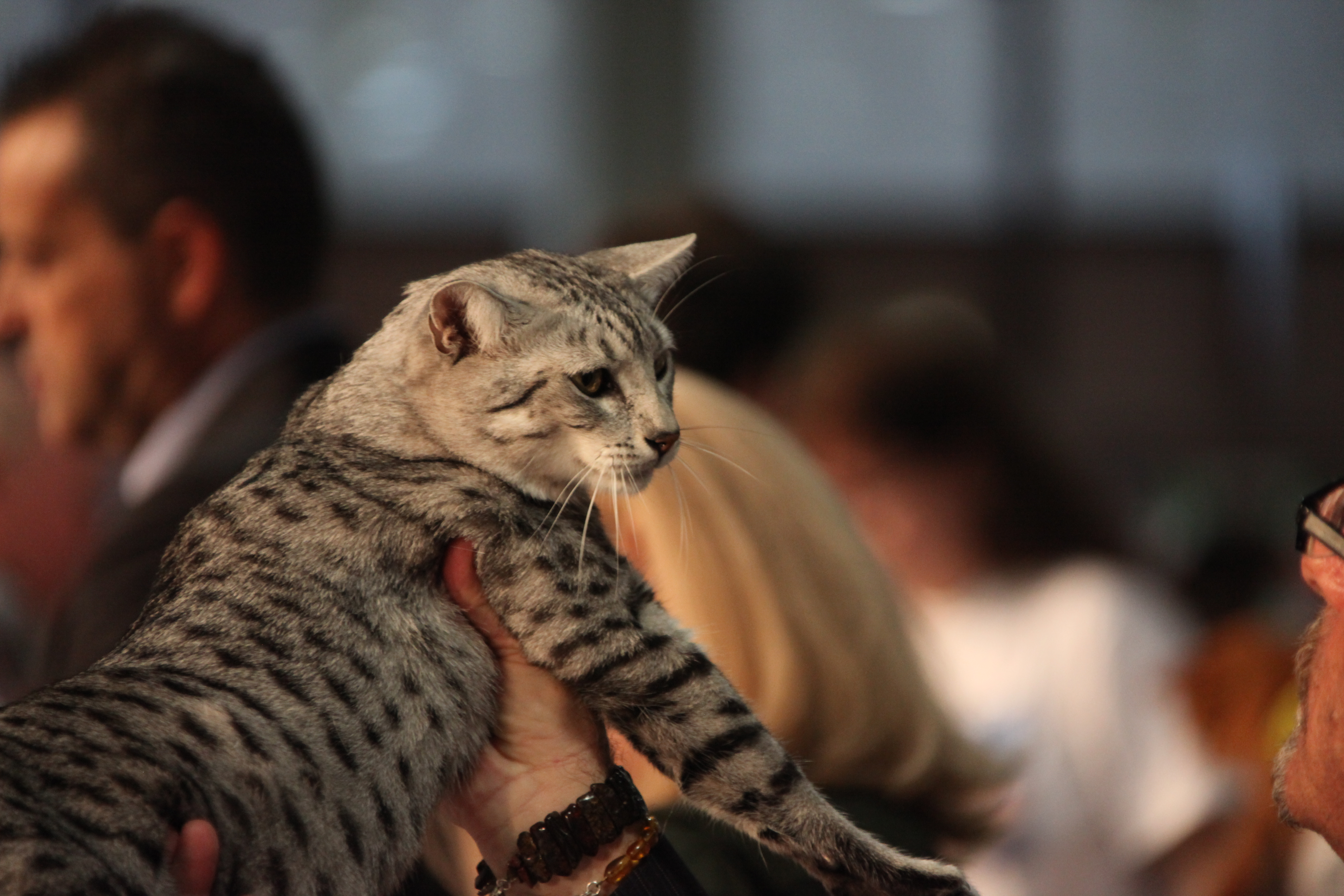 Photo 521